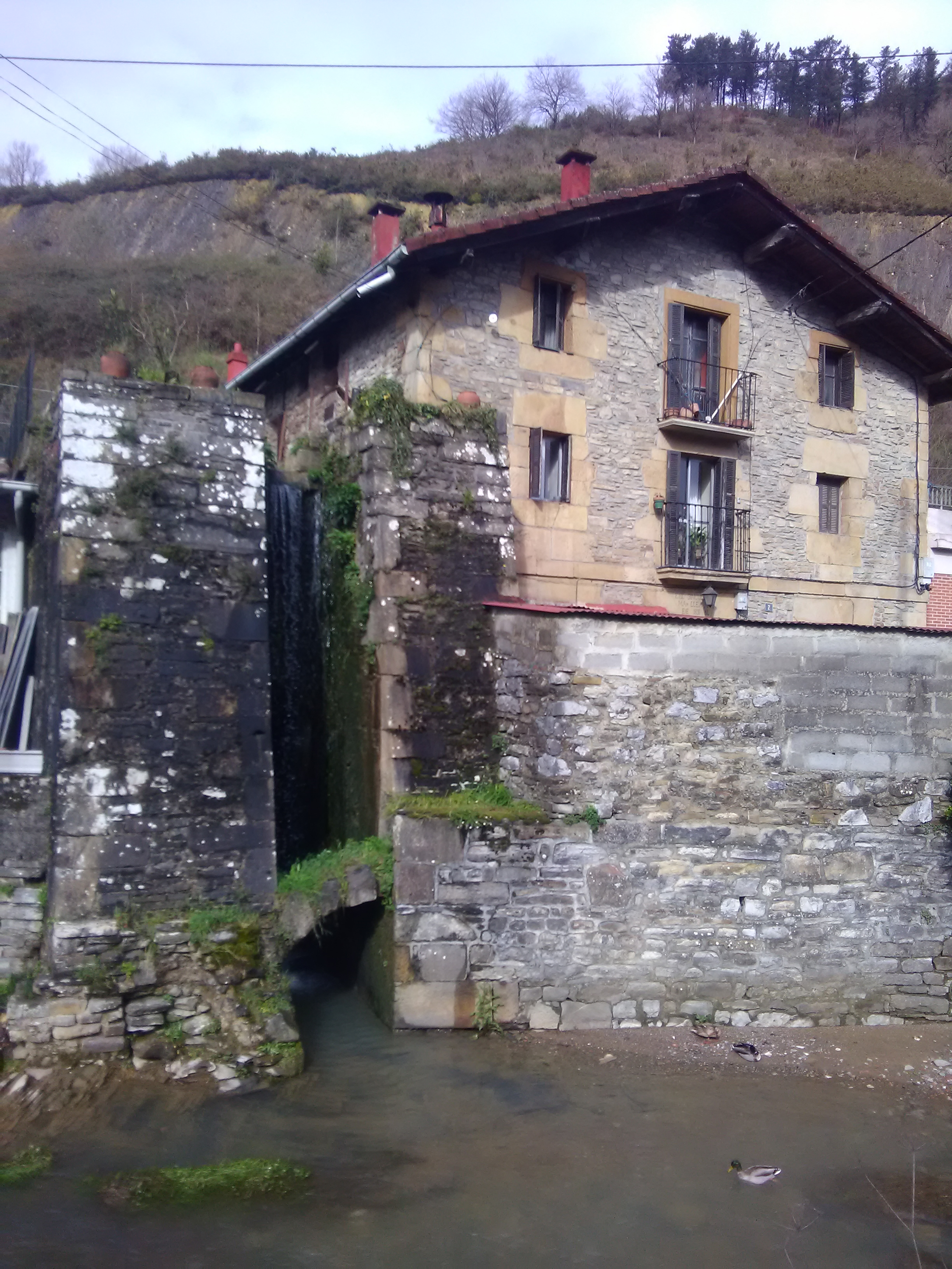 Olaerreaga etxea (edo Olaerregeaga), izen bereko Zaldibarko auzoan, Eibar eta Ermua artean. Burdinola hau Ego ibarra egitura administratiboaren parte zen XIII. mendean, Eibar eta Ermuko hiribilduak sortu baino lehen.